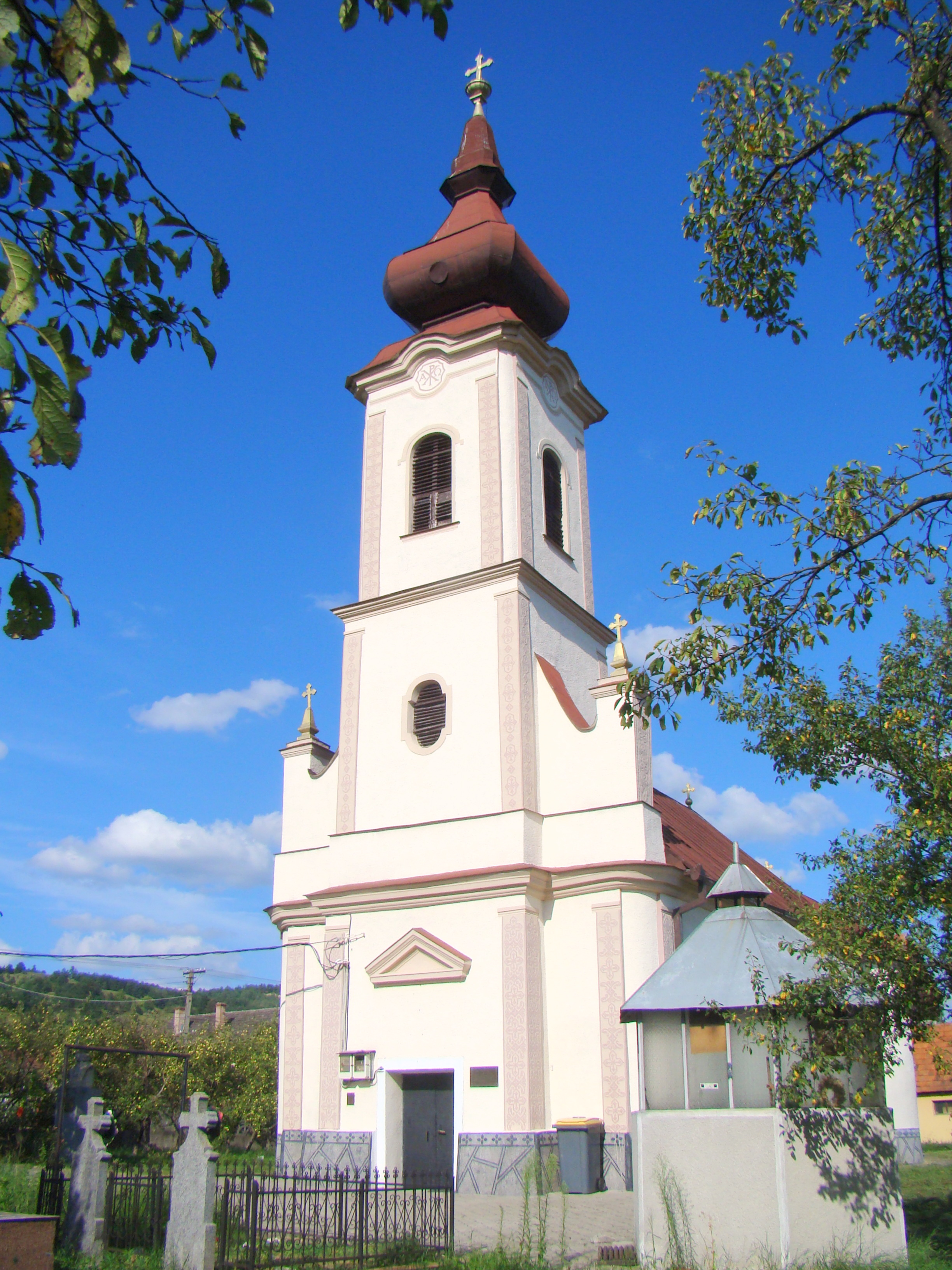 Biserica ortodoxă „Sf. Dumitru”, localitate componentă TINĂUD; oraș Aleșd